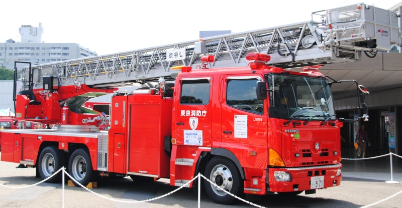 東京消防庁渋谷消防署のはしご車